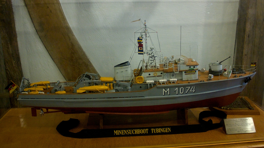 Modell des Minenjagdboots "Tübingen" ausgestellt im Tübinger Rathaus.